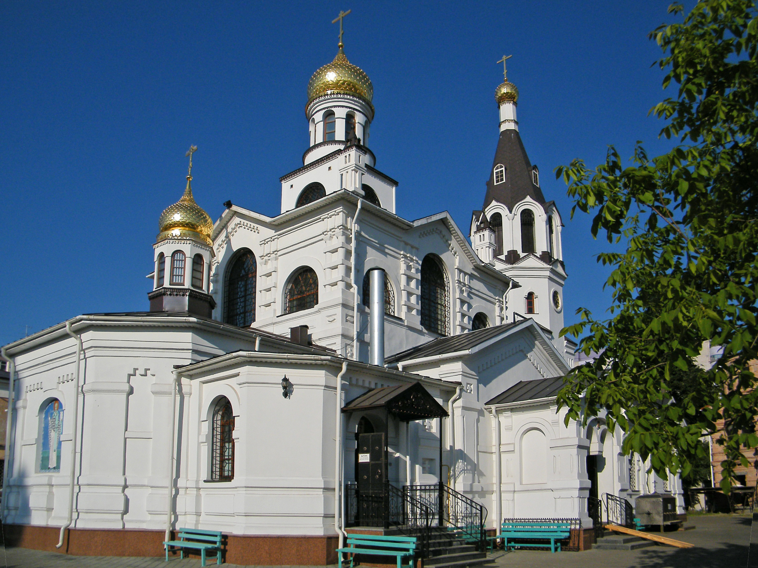 Свято-Никольский храм